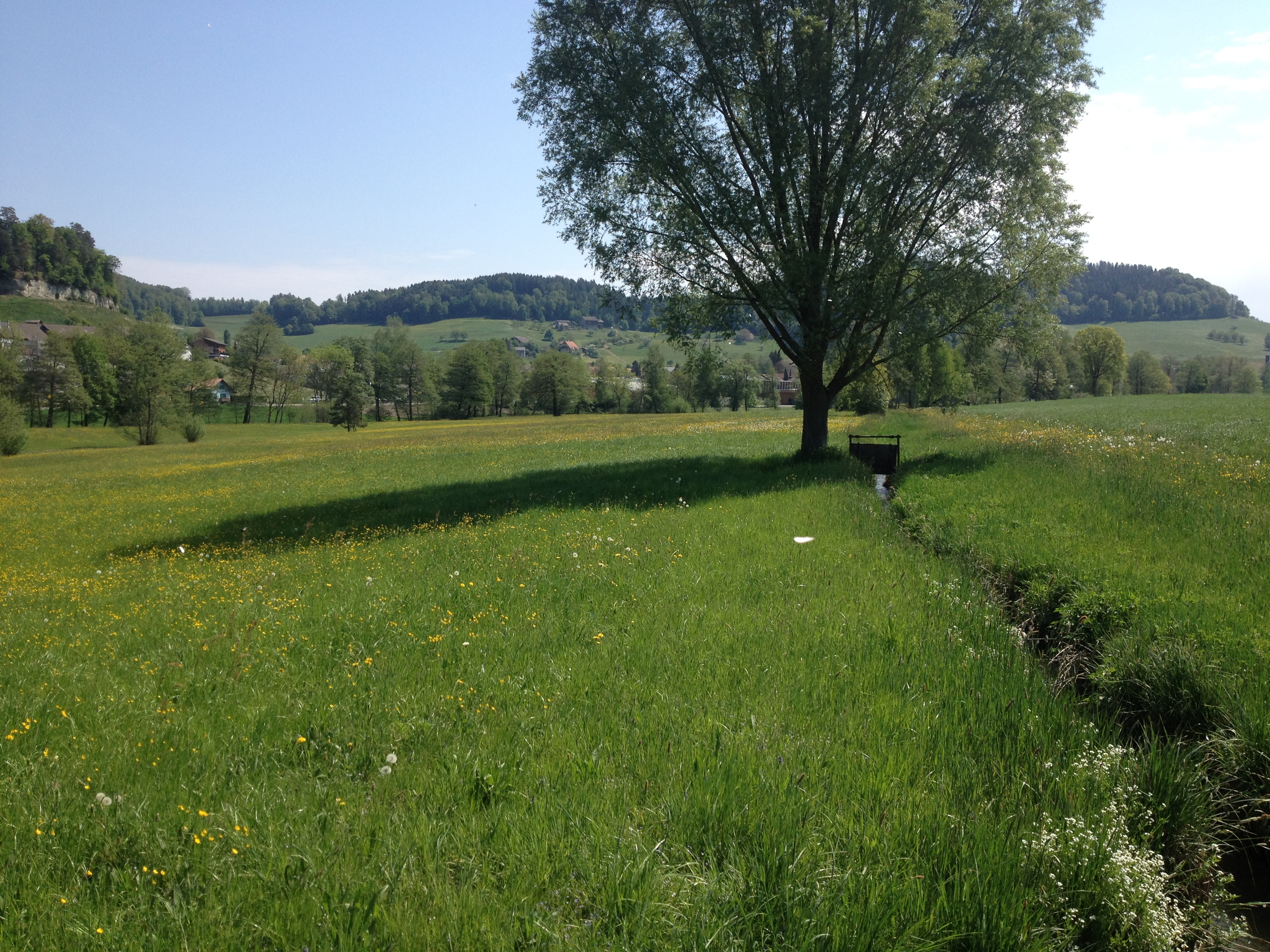 Blick in die Wässermatten Melchnau